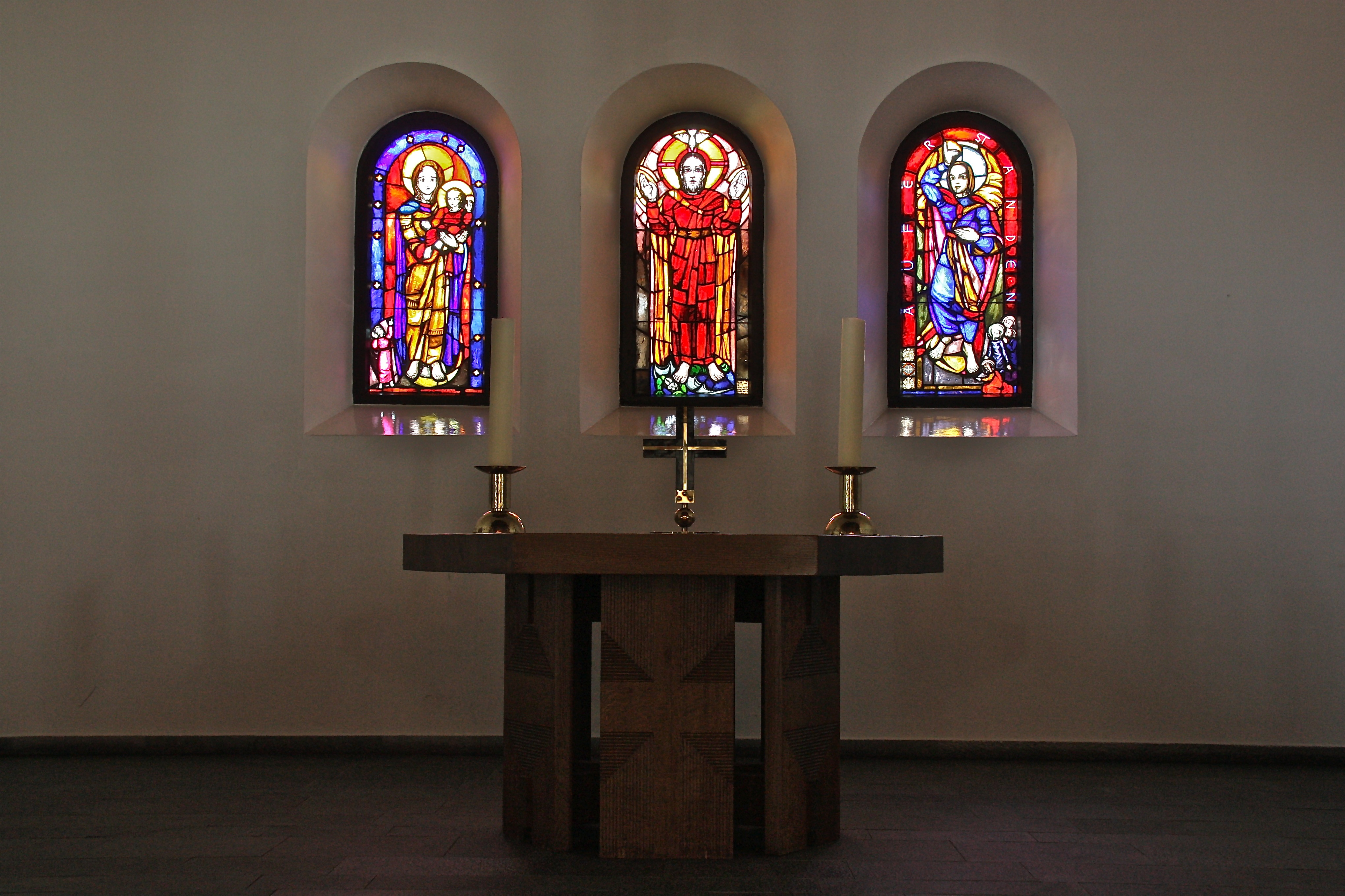 Hamburg, Wellingsbüttel, Lutherkirche, Innenraum, Altar und Fenster